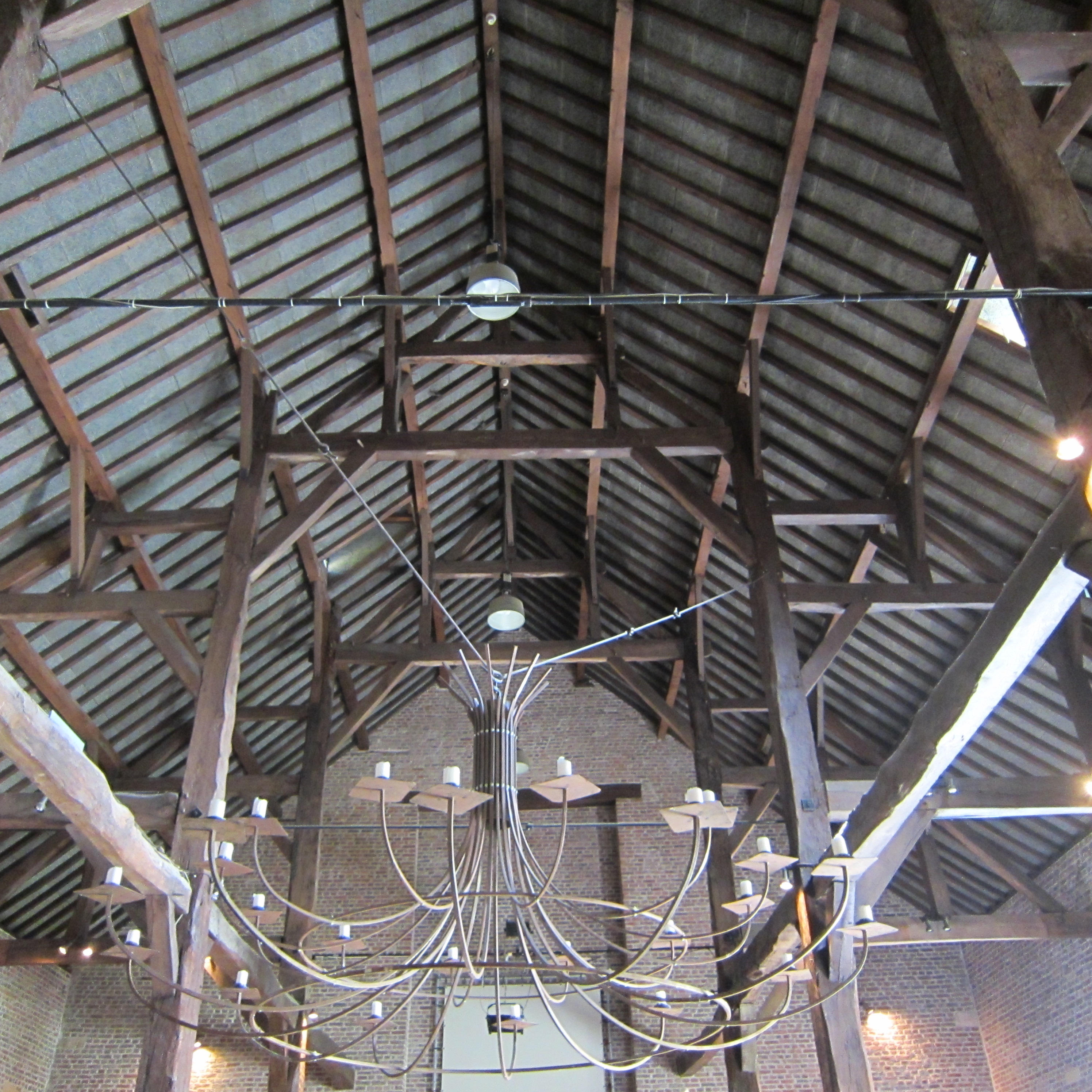 Tiendenschuur, Alden Biesen, Bilzen